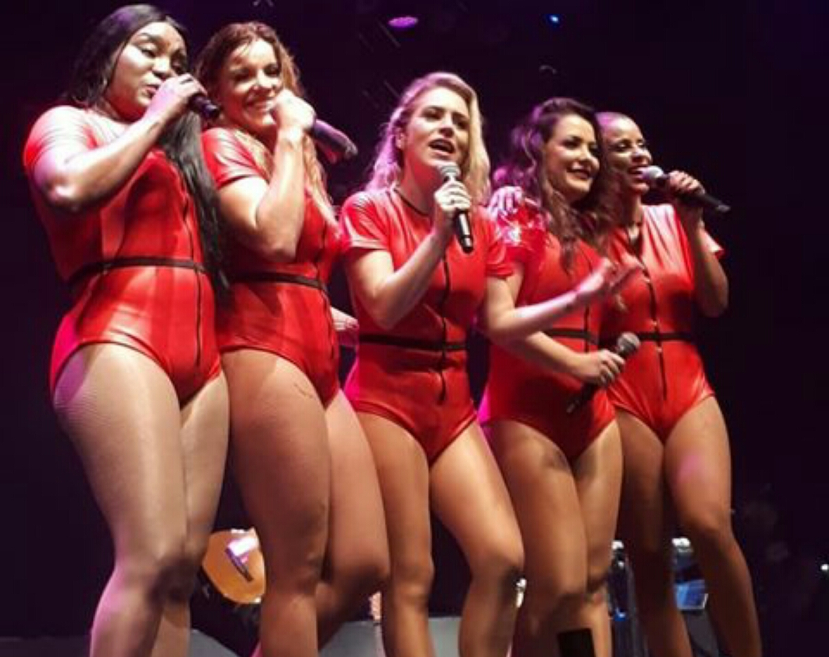 Rouge na turnê Rouge 15 Anos, em Porto Alegre.